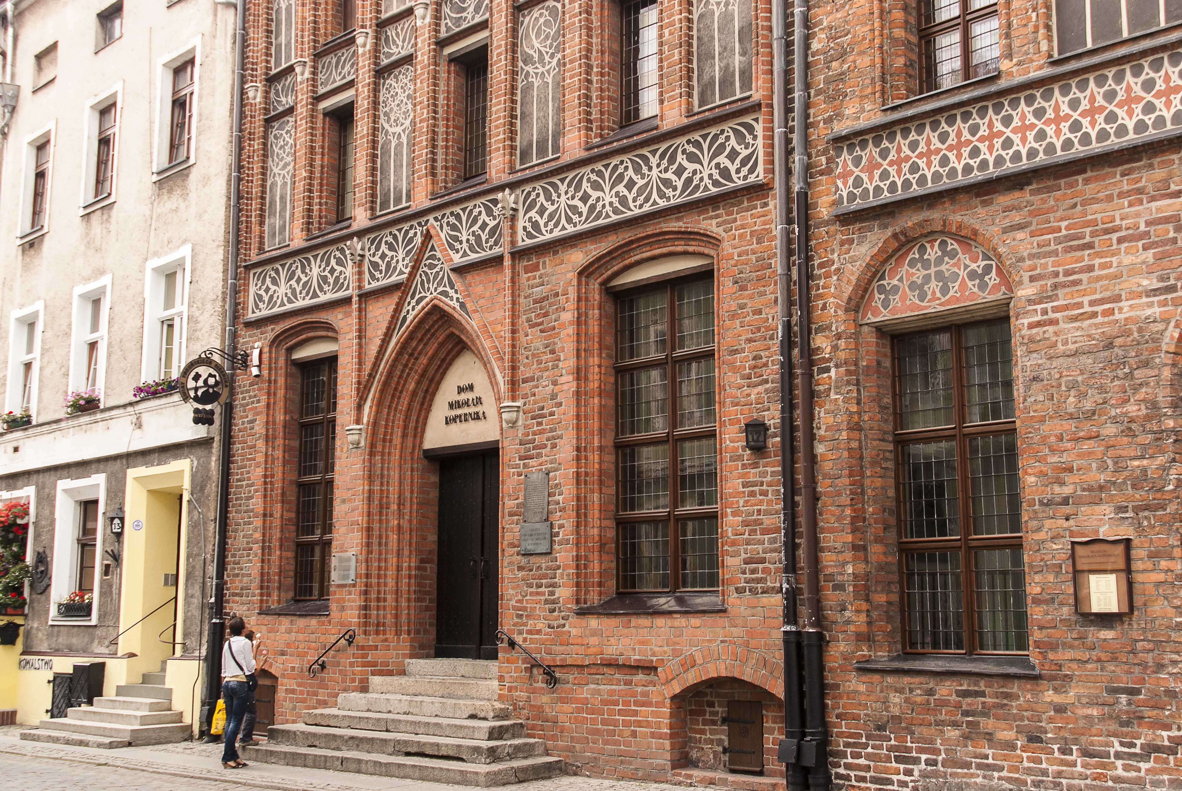 Toruń, ul. Kopernika - zespół dwóch kamienic gotyckich (partie dolne), od lewej: - Kopernika nr 15 (dawniej 13) - gotycka kamienica z oficynami, ok. 1350, obecnie część oddziału Muzeum Okręgowego - Dom Mikołaja Kopernika (zabytek nr A/962) - Kopernika nr 17 (dawniej 15) - gotycka kamienica "Dom Kopernika" ok. 1464-1480, XX w. (zabytek nr A/962 oraz 37/A)